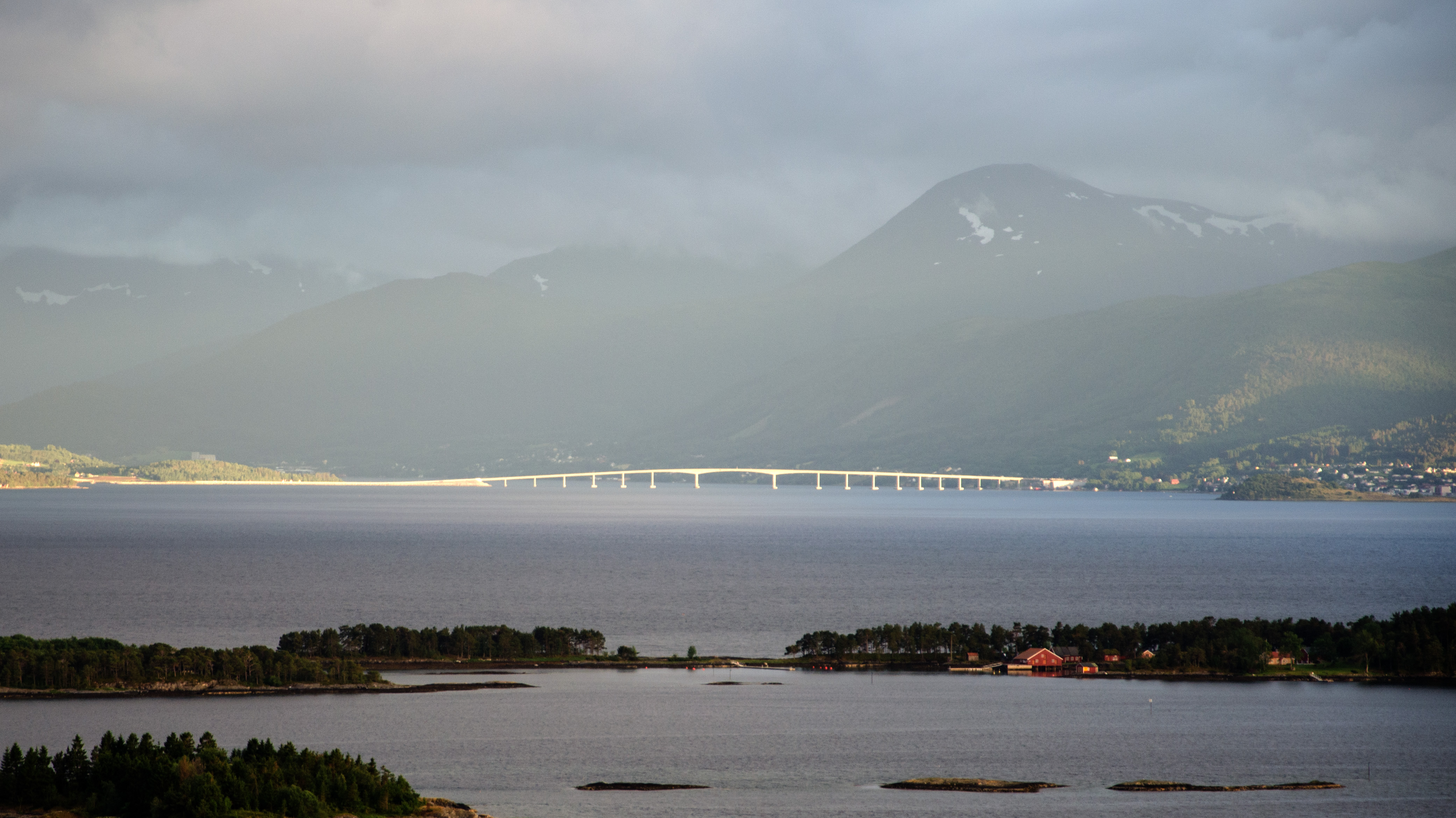 Tresfjordbrua